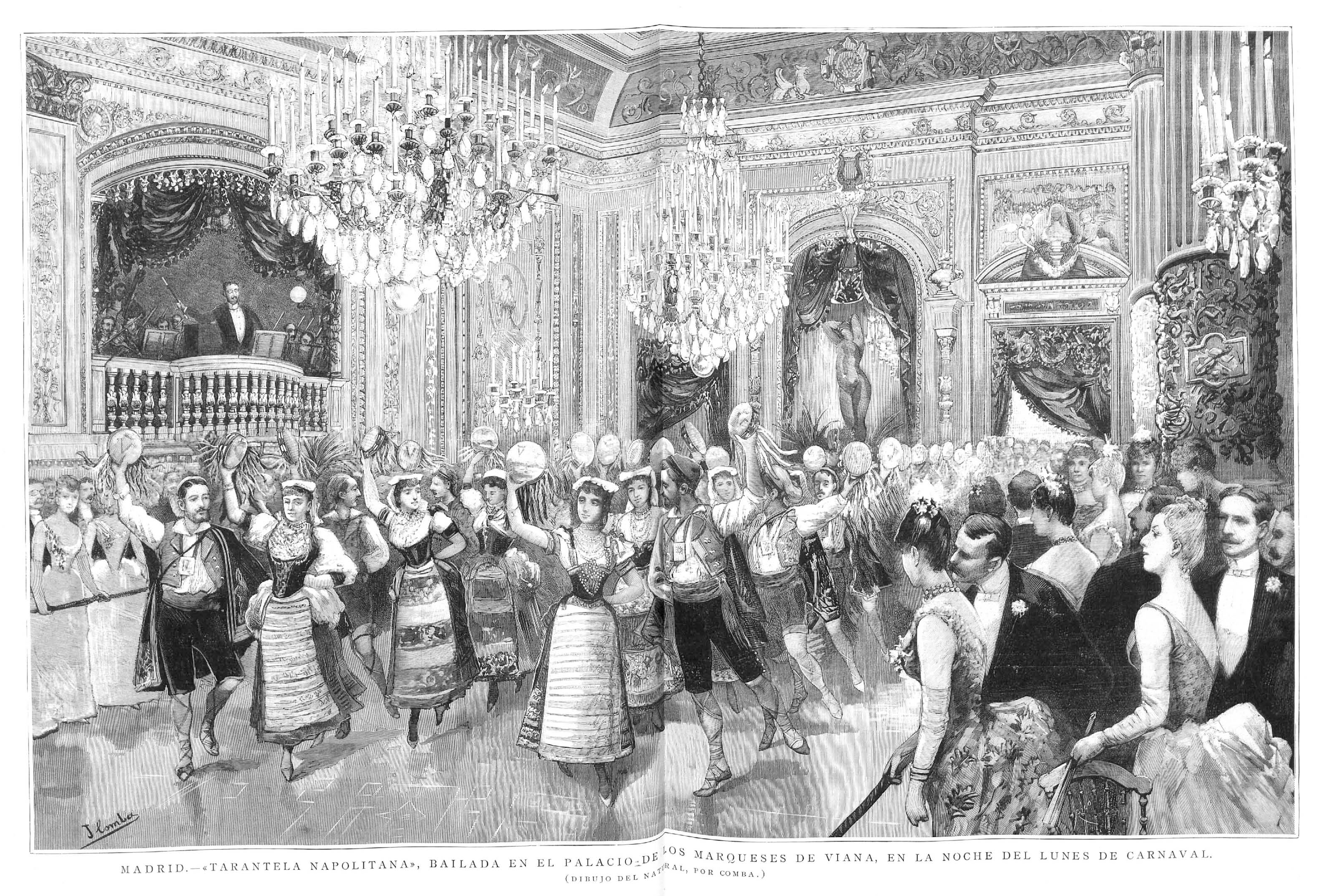 Madrid. "Tarantela napolitana" bailada en el palacio de los Marqueses de Viana, en la noche del lunes de carnaval.